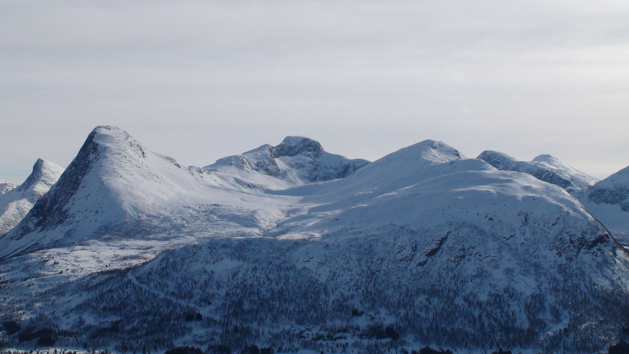 Holtefjellet i midten av bildet, sett fra Kringdalen